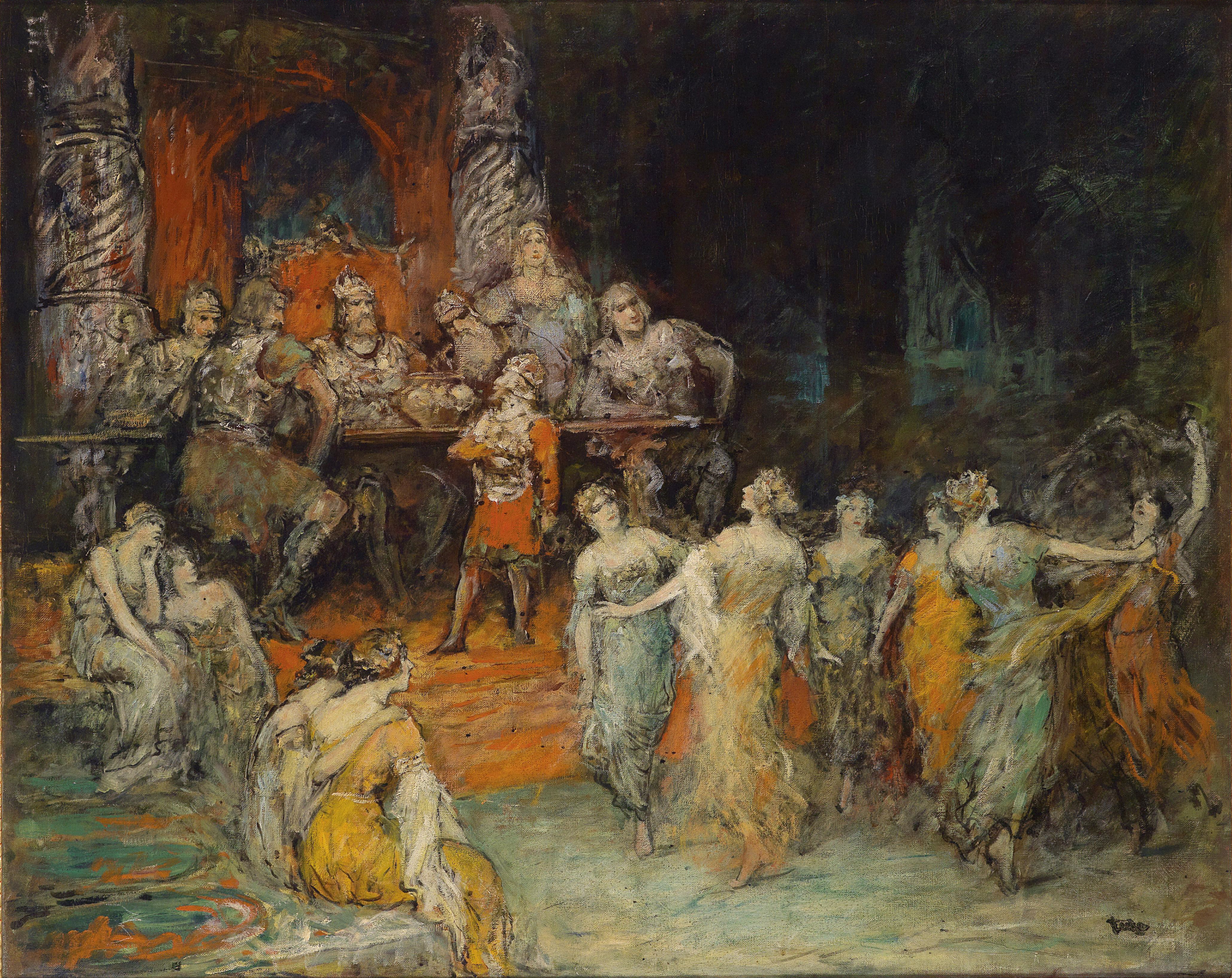 Zwergenkönig Laurin am Hof des Dietrich von Bern, signiert Leeke, Öl auf Leinwand, 79 x 100 cm